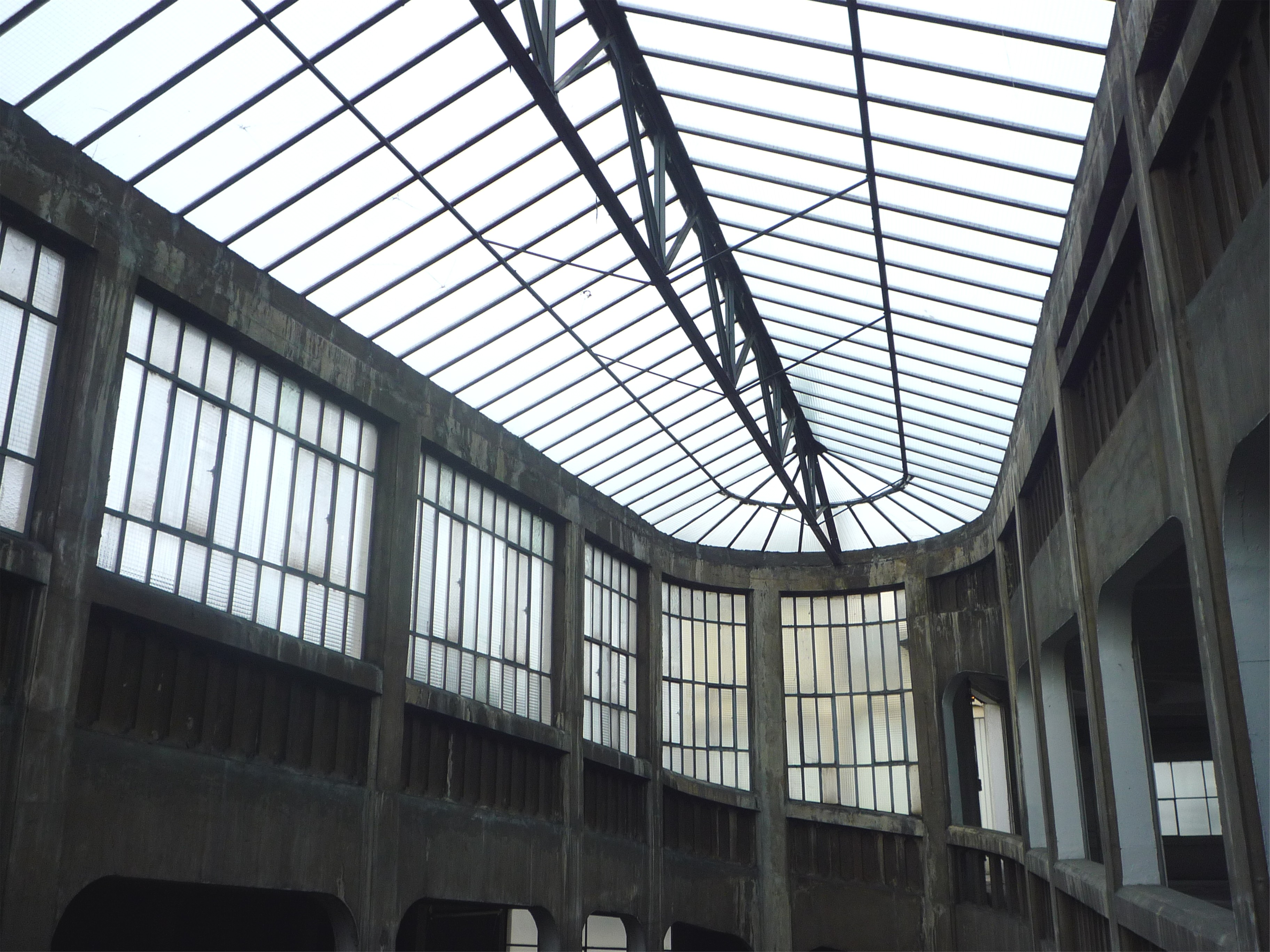 Garage hélicoïdal de Grenoble (1932) - verrière sommitale